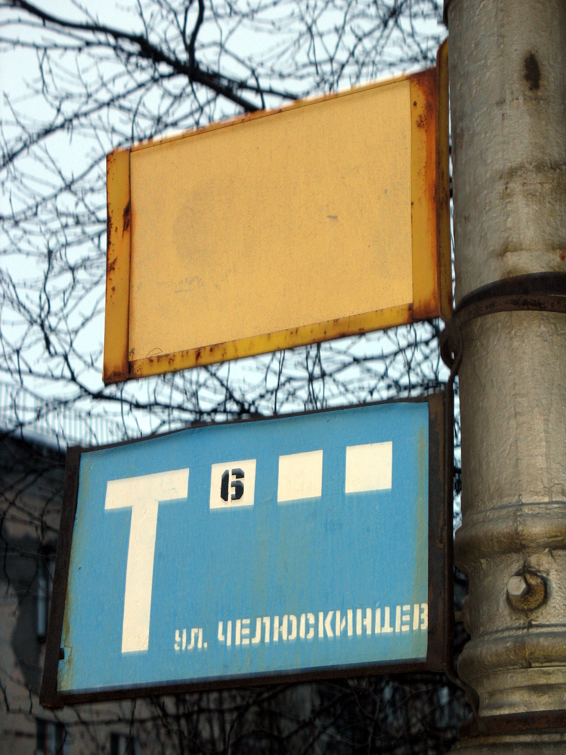 Таблички общественного транспорта